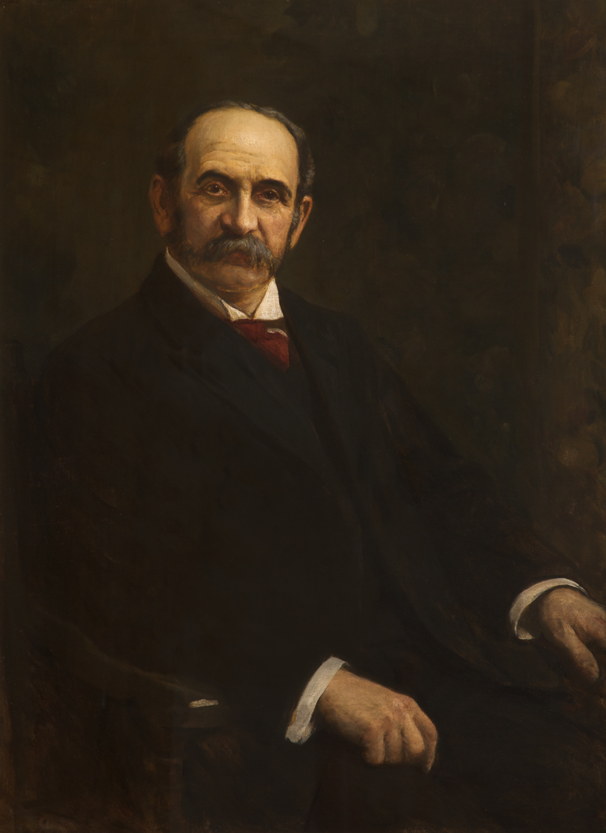 Julius Dreschfeld FRCP (13 October 1845 – 13 June 1907)